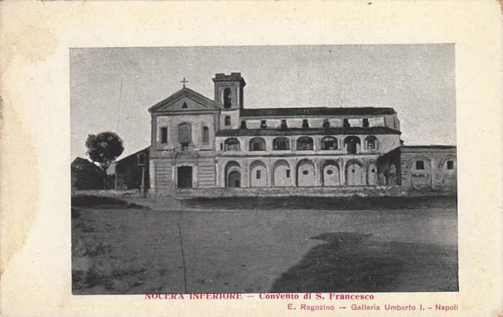 Prospetto del convento di Santa Maria degli Angeli a Nocera (cartolina di inizio 900)